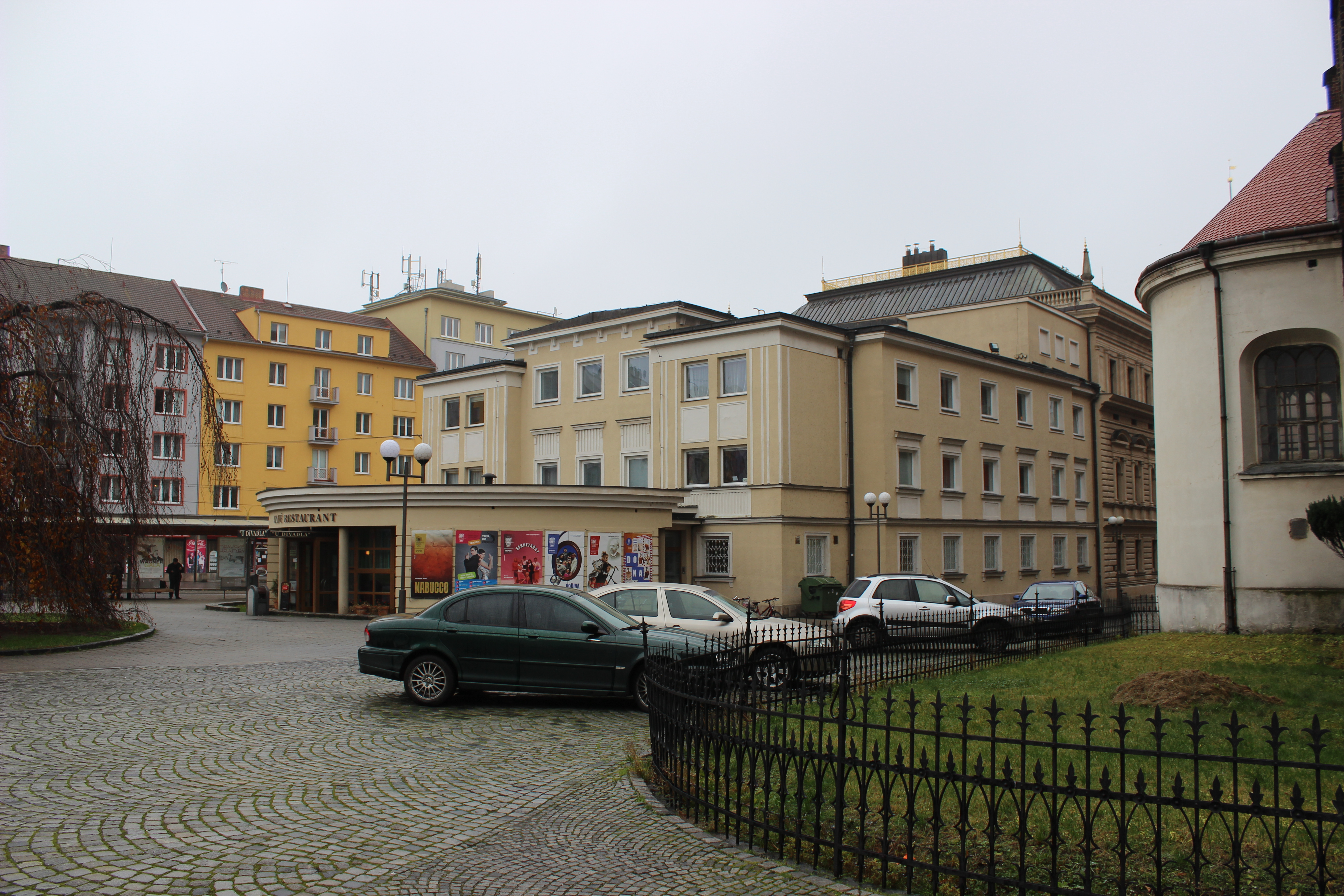 Pohled na opavské Slezské divadlo od západu.